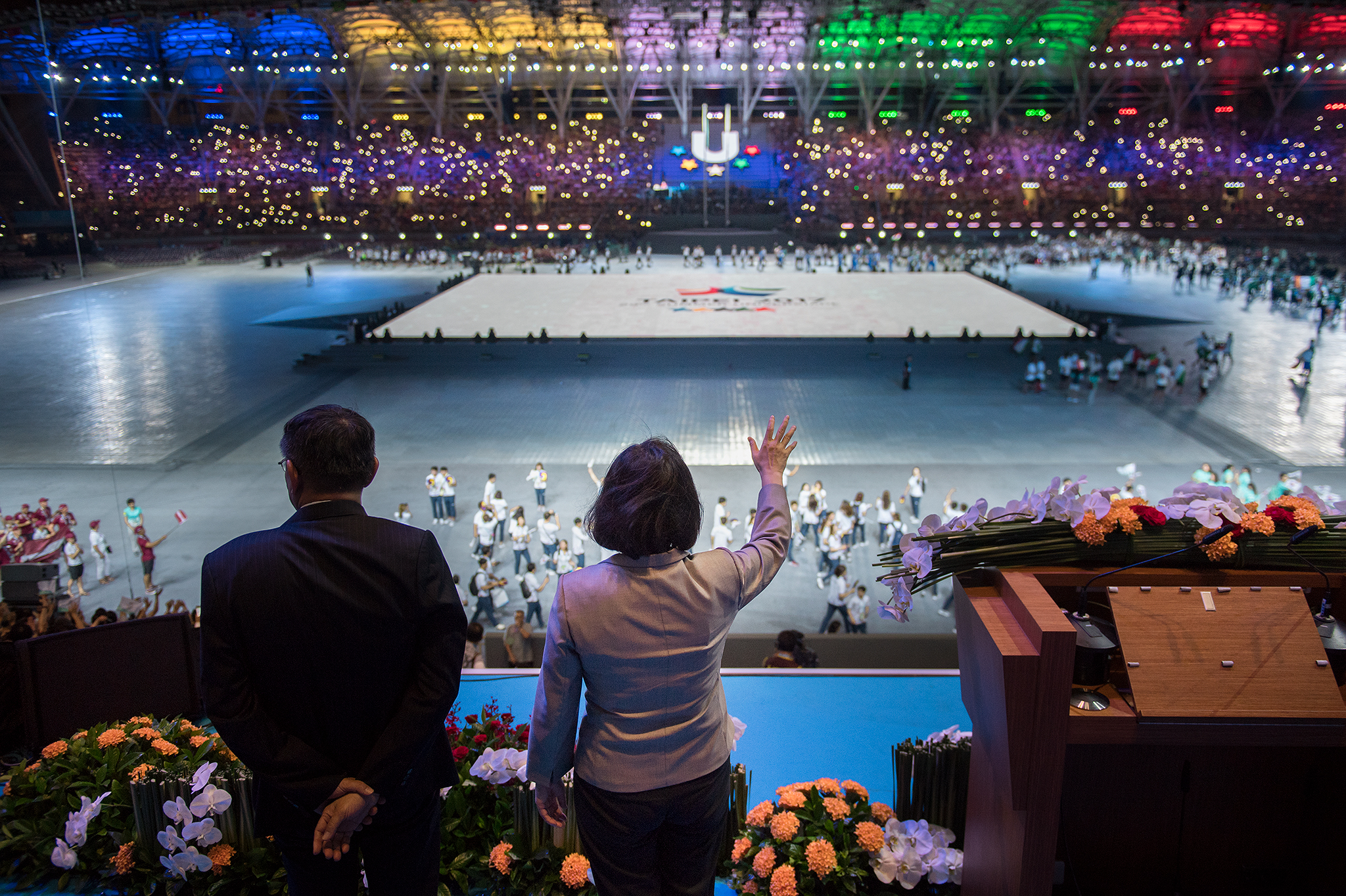 08.19 總統出席2017年世界大學運動會開幕典禮